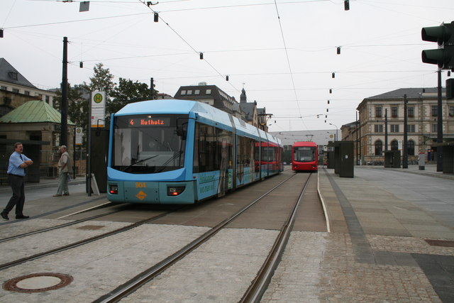 Trams at Chemnitz Hauptbahnhof